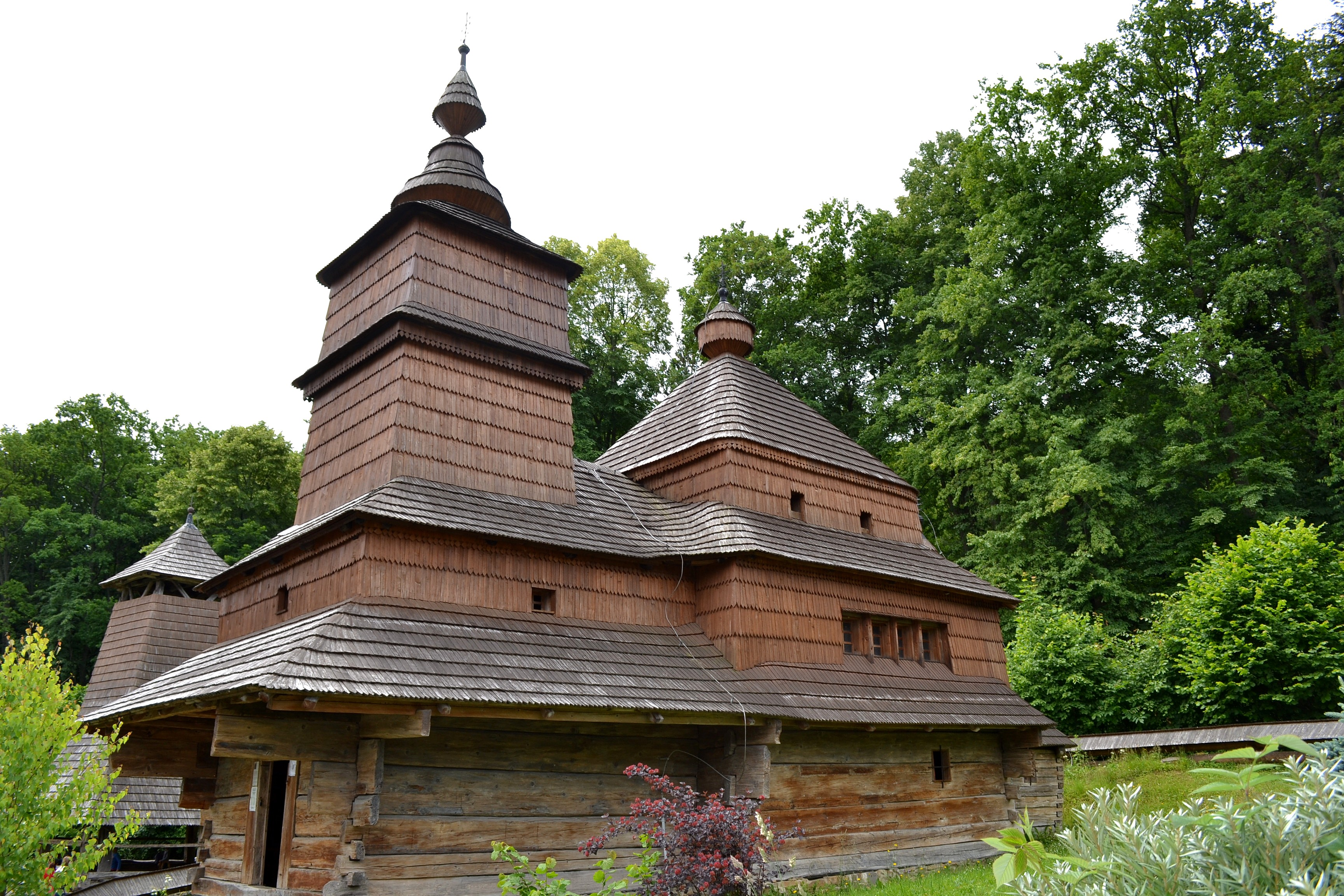 Kostol svätého Mikuláša biskupa zo Zboja (okr. Snina); celkový pohľad